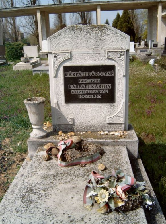 Kárpáti Károly, eredetileg Kellner Károly (Eger, 1906. július 2. – Budapest, 1996. szeptember 23.) olimpiai bajnok birkózó, edző, szakíró, sportvezető sírja Budapesten. Kozma utcai zsidó temető: 5B-5-31.